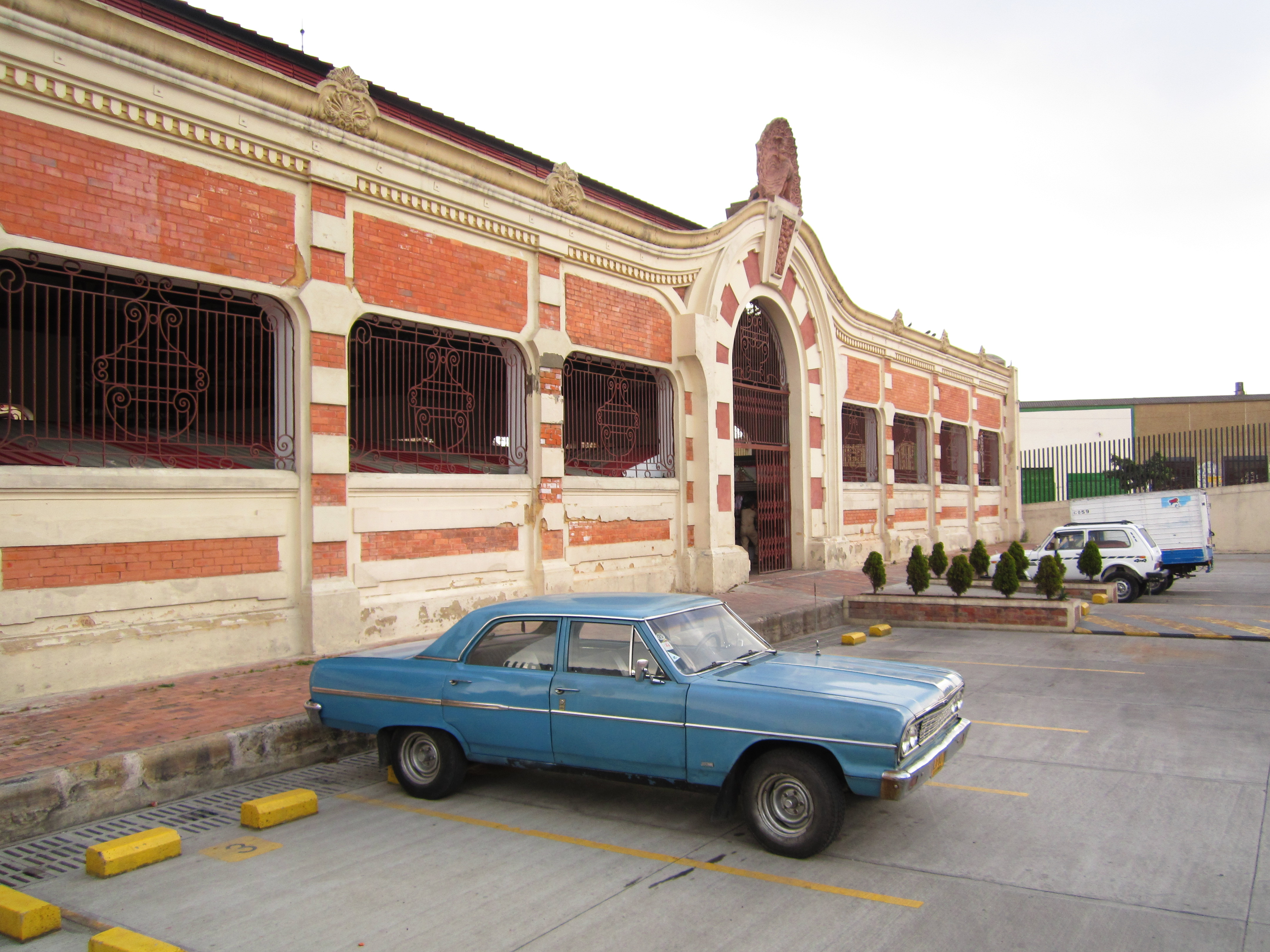 Plaza de mercado del barrio Las Cruces en el centro de Bogotá.